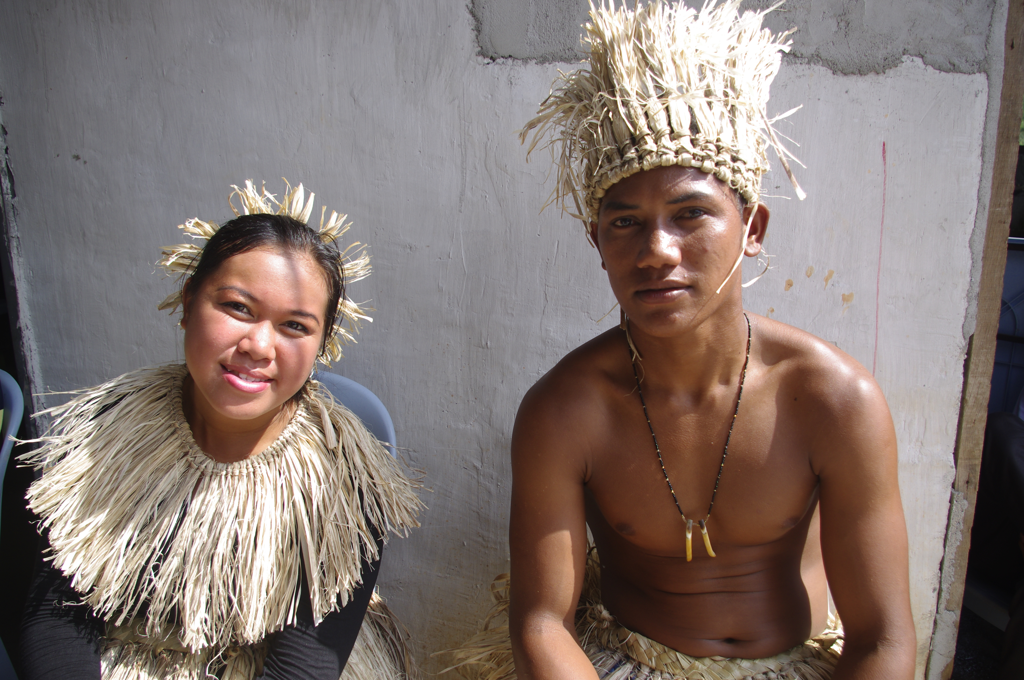 Orang Seletar